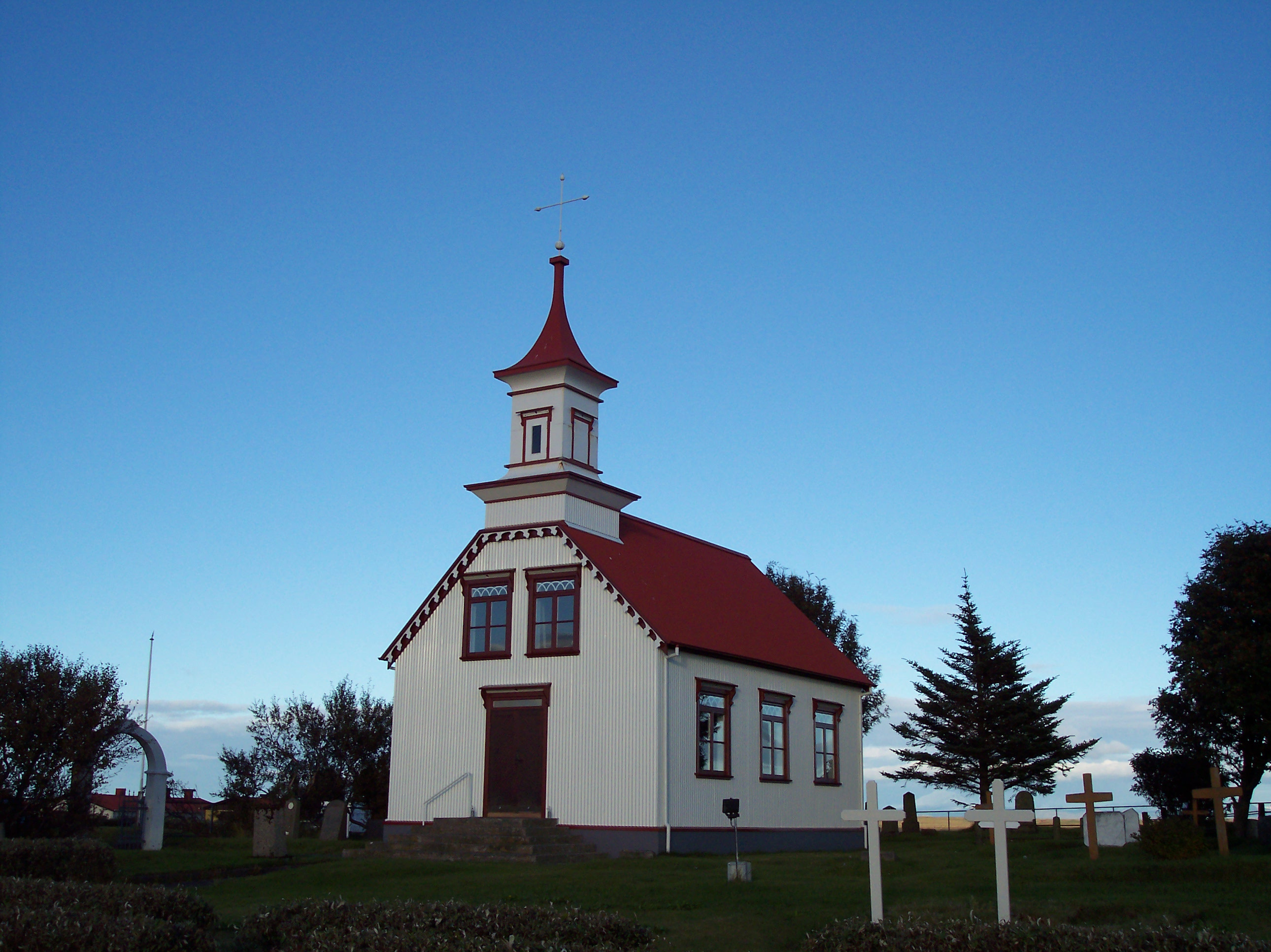 Villingaholtskirkja er í Hraungerðisprestakalli í Árnesprófastsdæmi. Hún var byggð á árunum 1910-1911 úr járnvörðu timbri á hlöðnum grunni. Hún er með turni og sönglofti og tekur 100 manns í sæti.